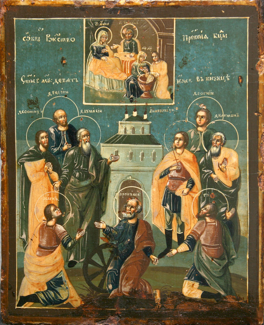 Девять мучеников Кизических с с иконой Рождества Богородицы. Слобода Холуй, конец XVIII в. Оклад - около 1868 г. Дерево, левкас, темпера, творёное серебро. 27х21,5 см. Частное собрание